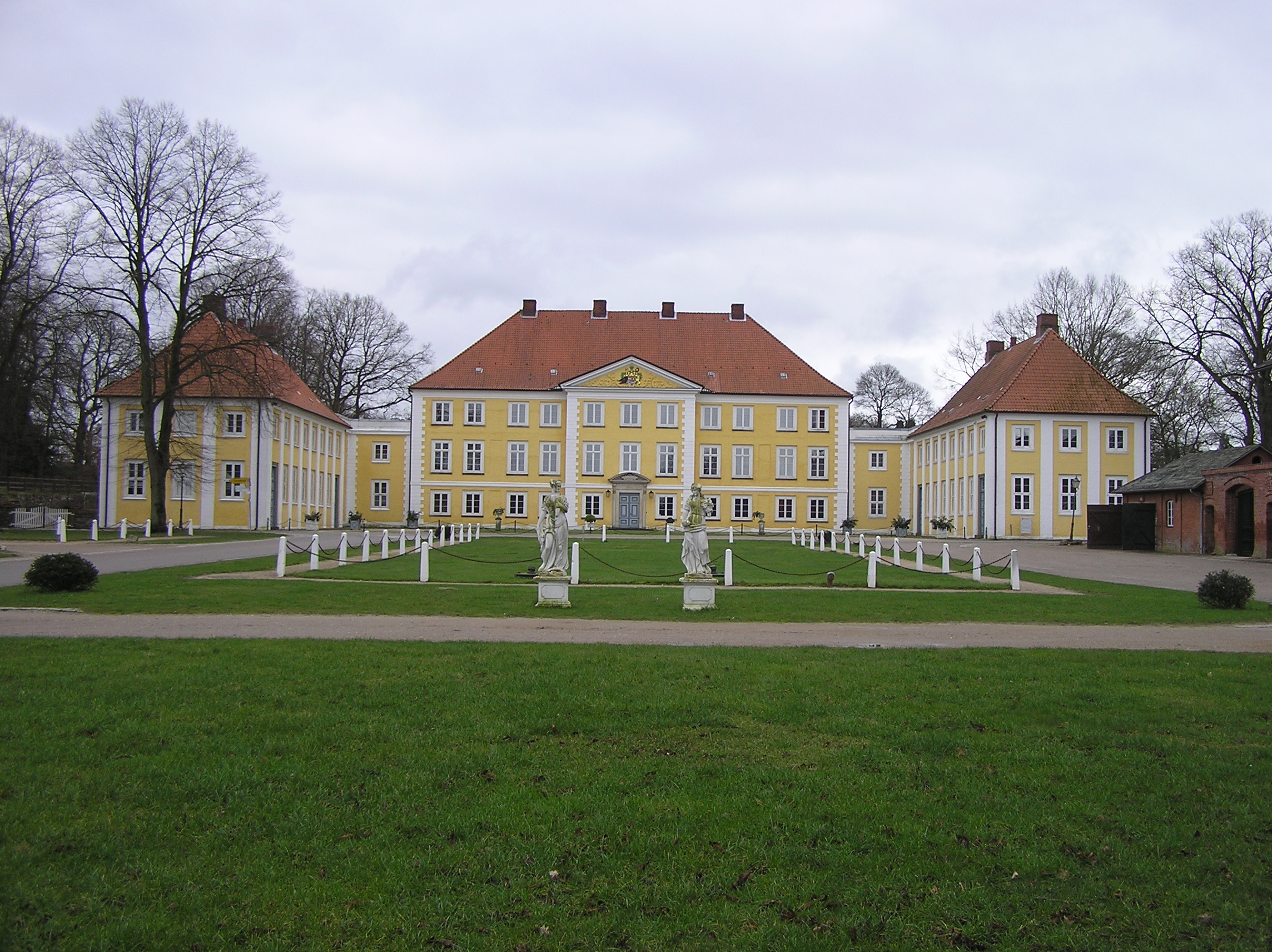 Gut Wotersen Herrenhaus